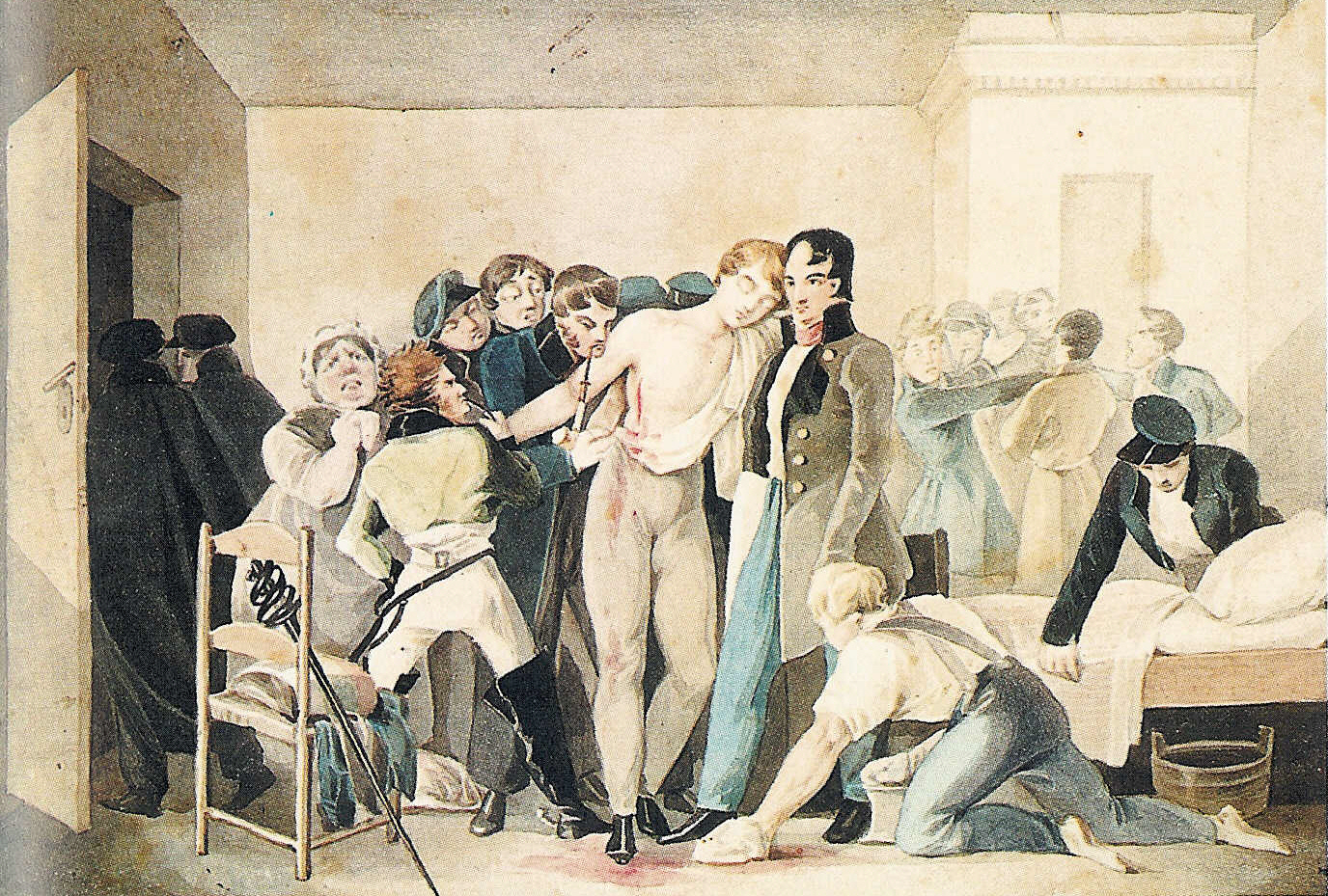 "Die Abfuhr", Aquarell von Johann Heinrich Ramberg, Göttingen 1818